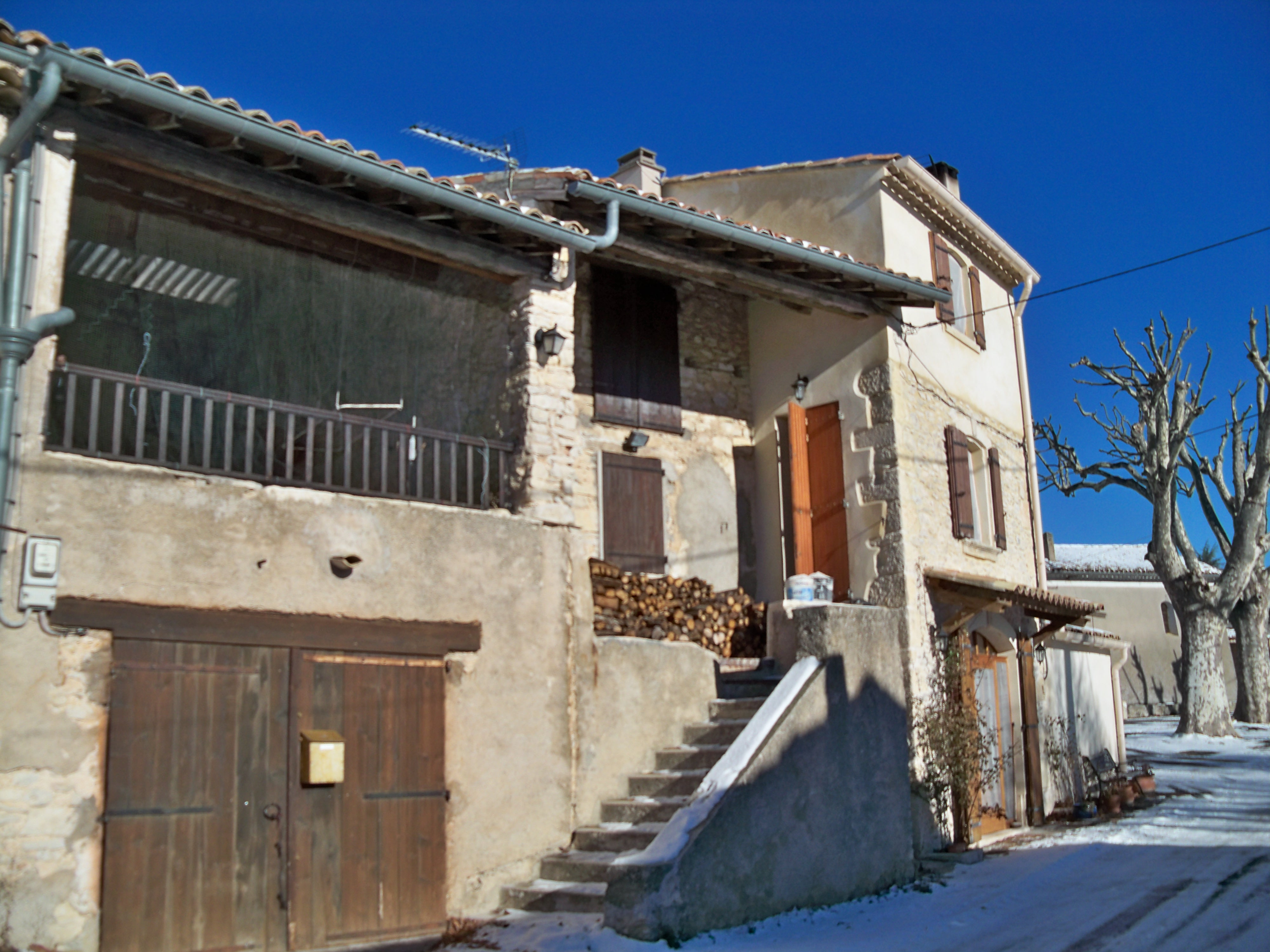 Maison en hauteur à Ferrassières, Drôme, France